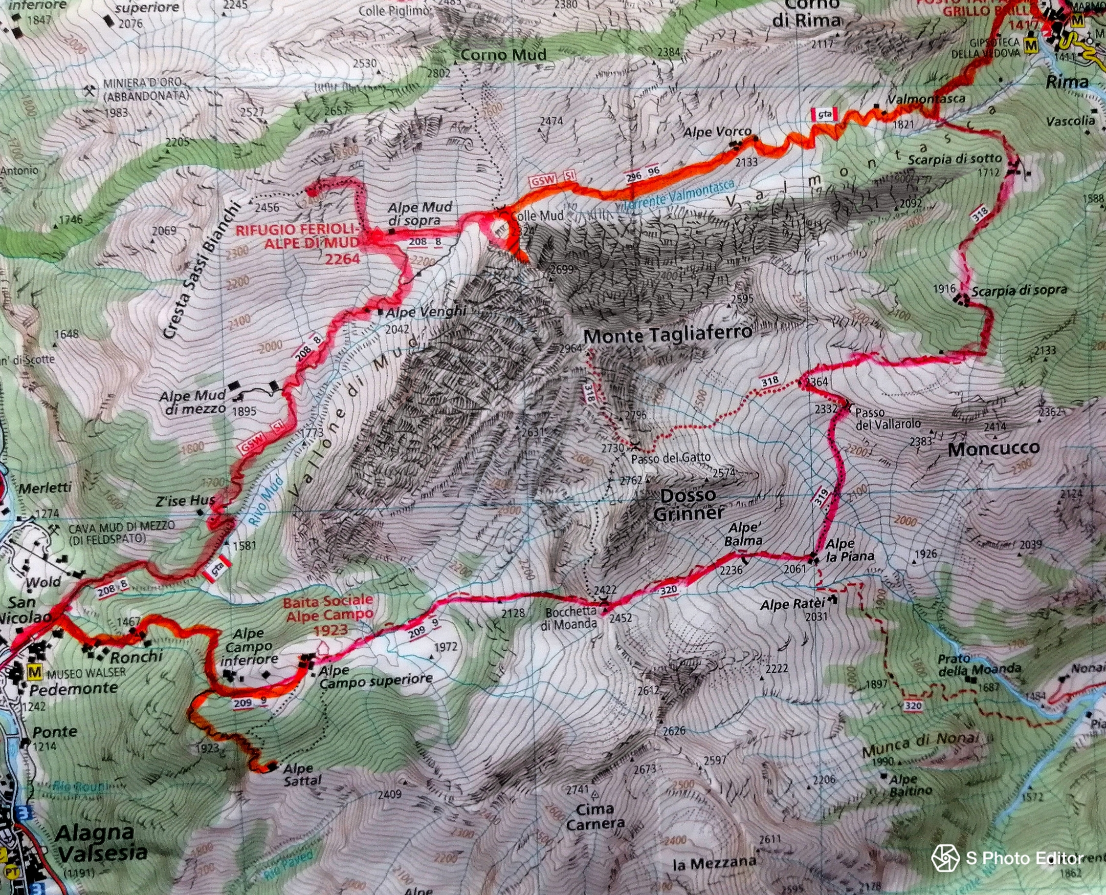 Tour ad anello del Monte Tagliaferro, 2964 m, escursione ad anello di due o tre giorni